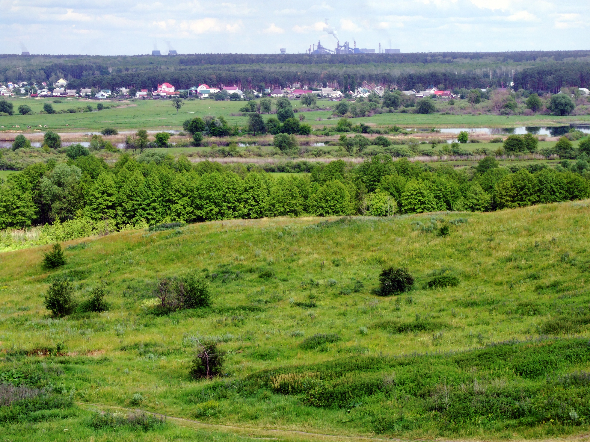 Вид на Пасечки